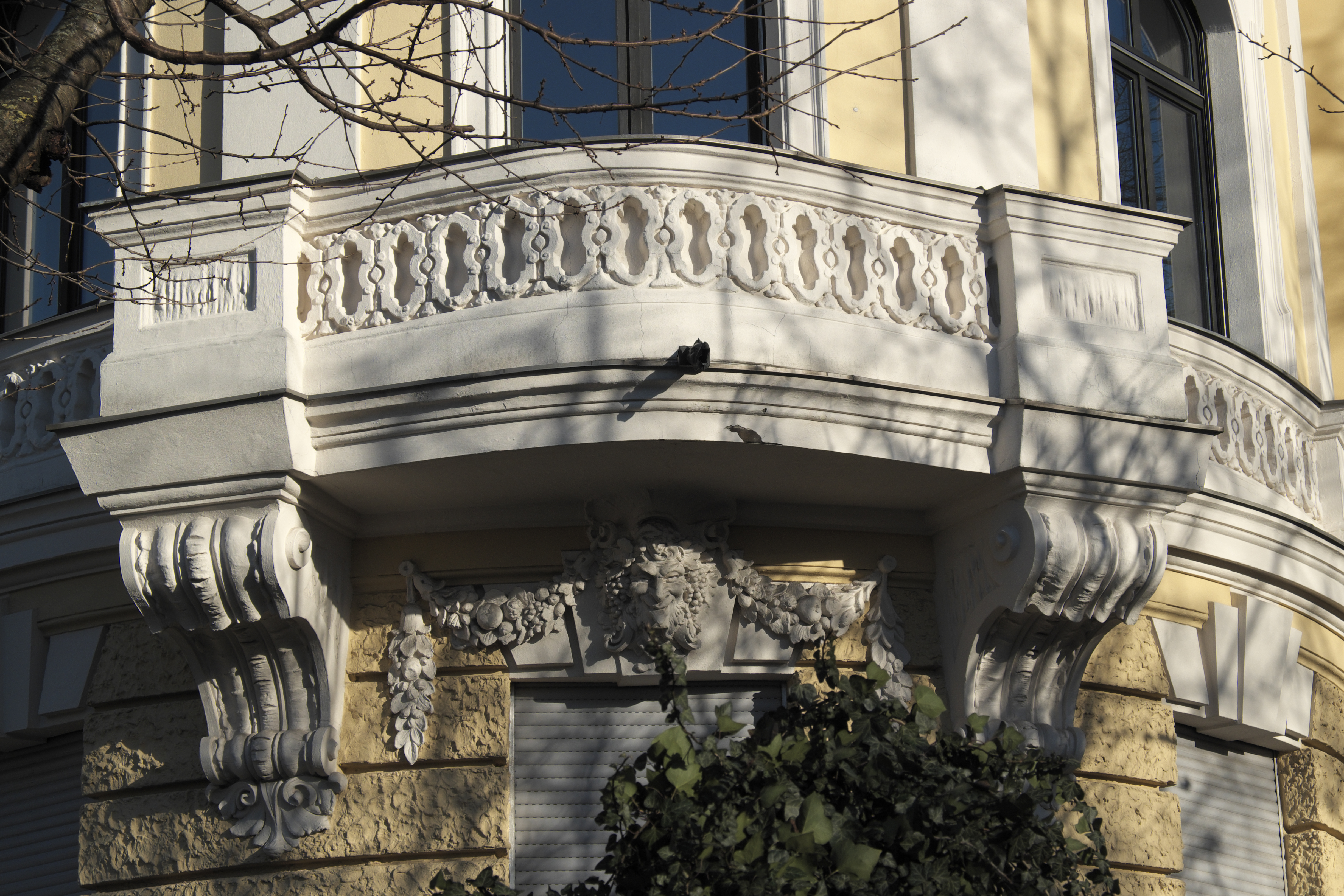 Mietshaus in der Mozartstraße 18 in der Ludwigsvorstadt im Stadtbezirk Ludwigsvorstadt-Isarvorstadt in München (Bayern/Deutschland), 1896 von Albert Theodor Lenz erbaut, Maskaron unter einem Balkon